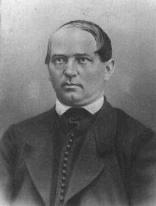 Antonín Husák (1819-1896), český římskokatolický kněz a politik